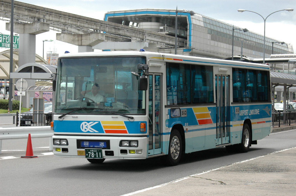 大阪空港にて撮影（川西系統）